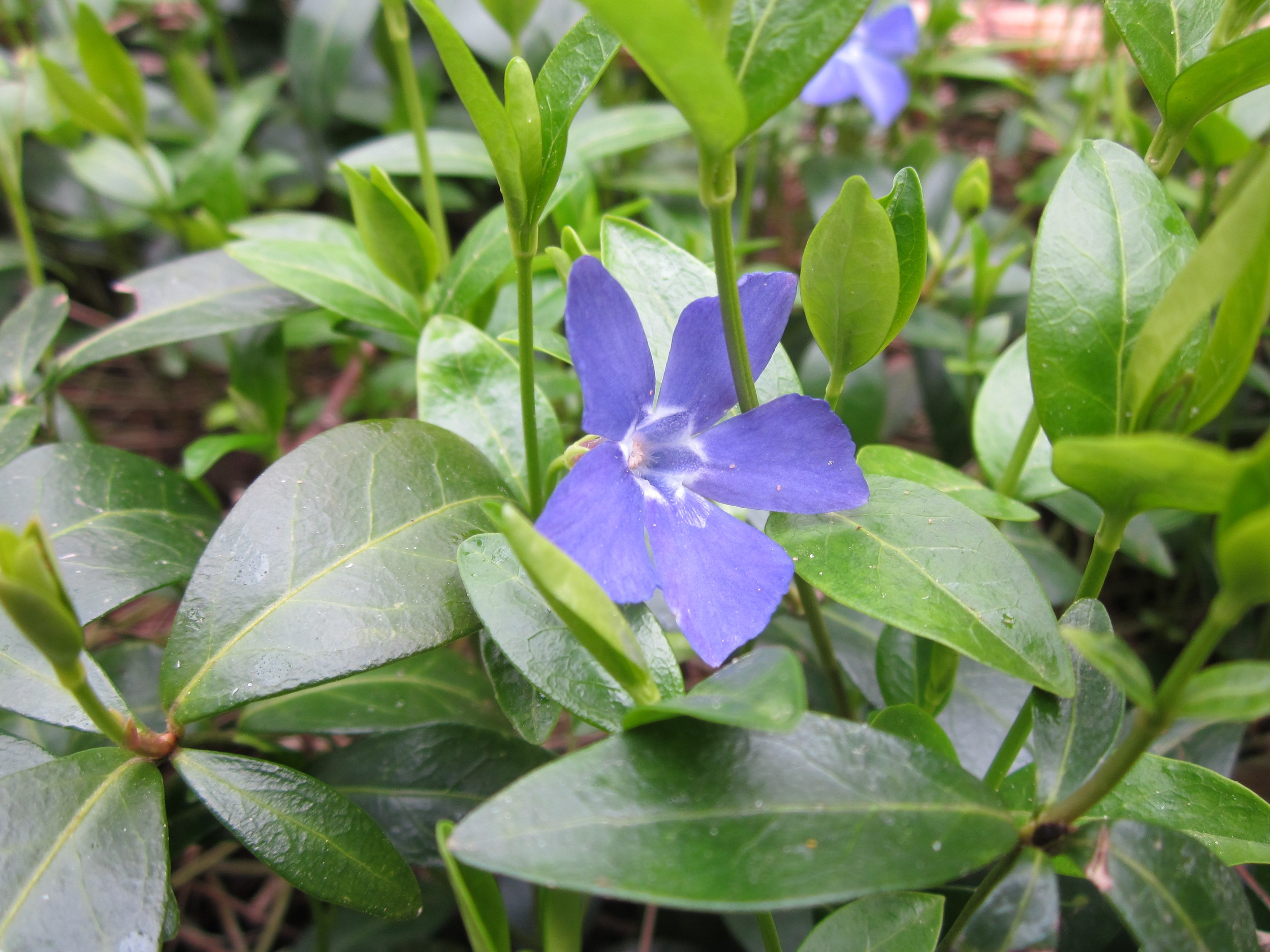 Kleines Immergrün (Vinca minor) im Bürgerpark Saarbrücken